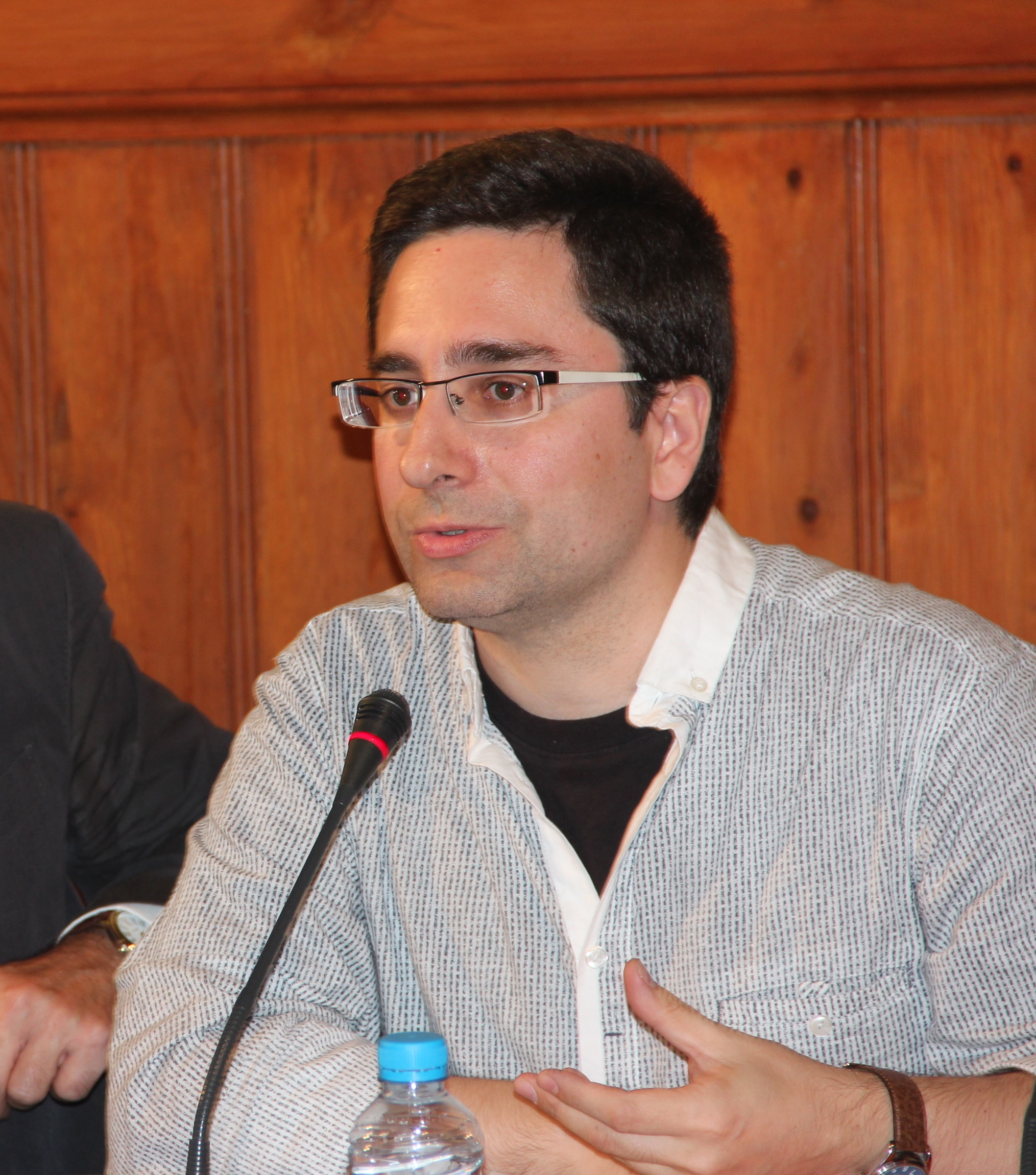 Héctor Parra a l'Institut Ramon Llull.